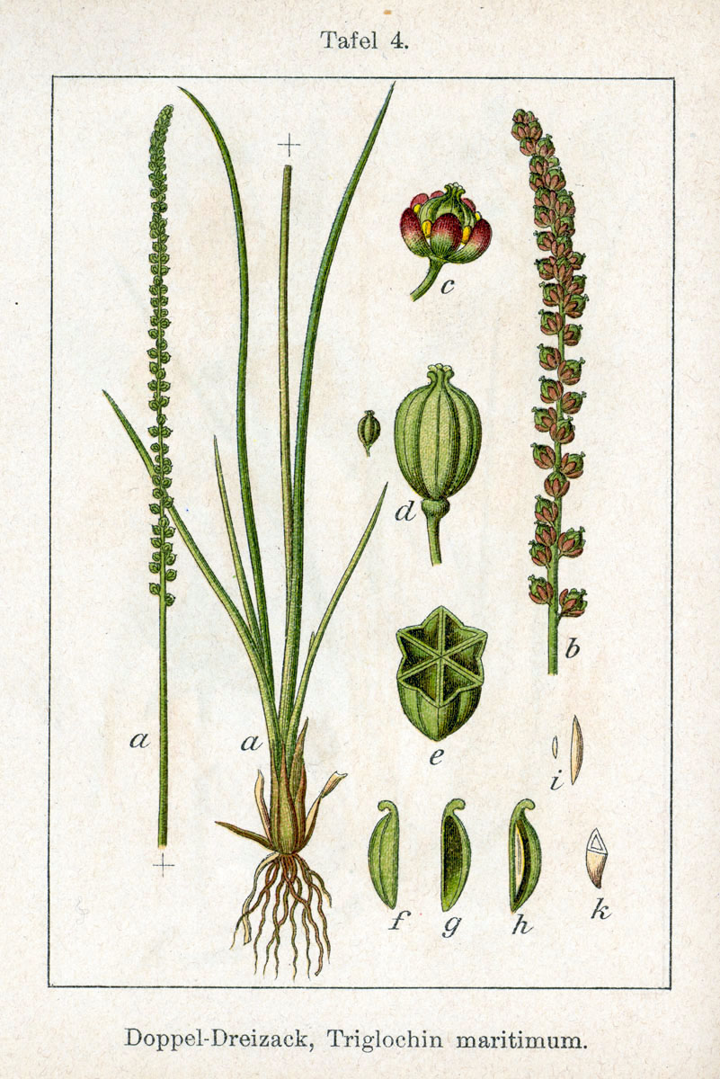 FloraWeb.de, : Triglochin maritimum L. : Triglochin maritima L. Original Description Doppel-Dreizack, Triglochin maritimum